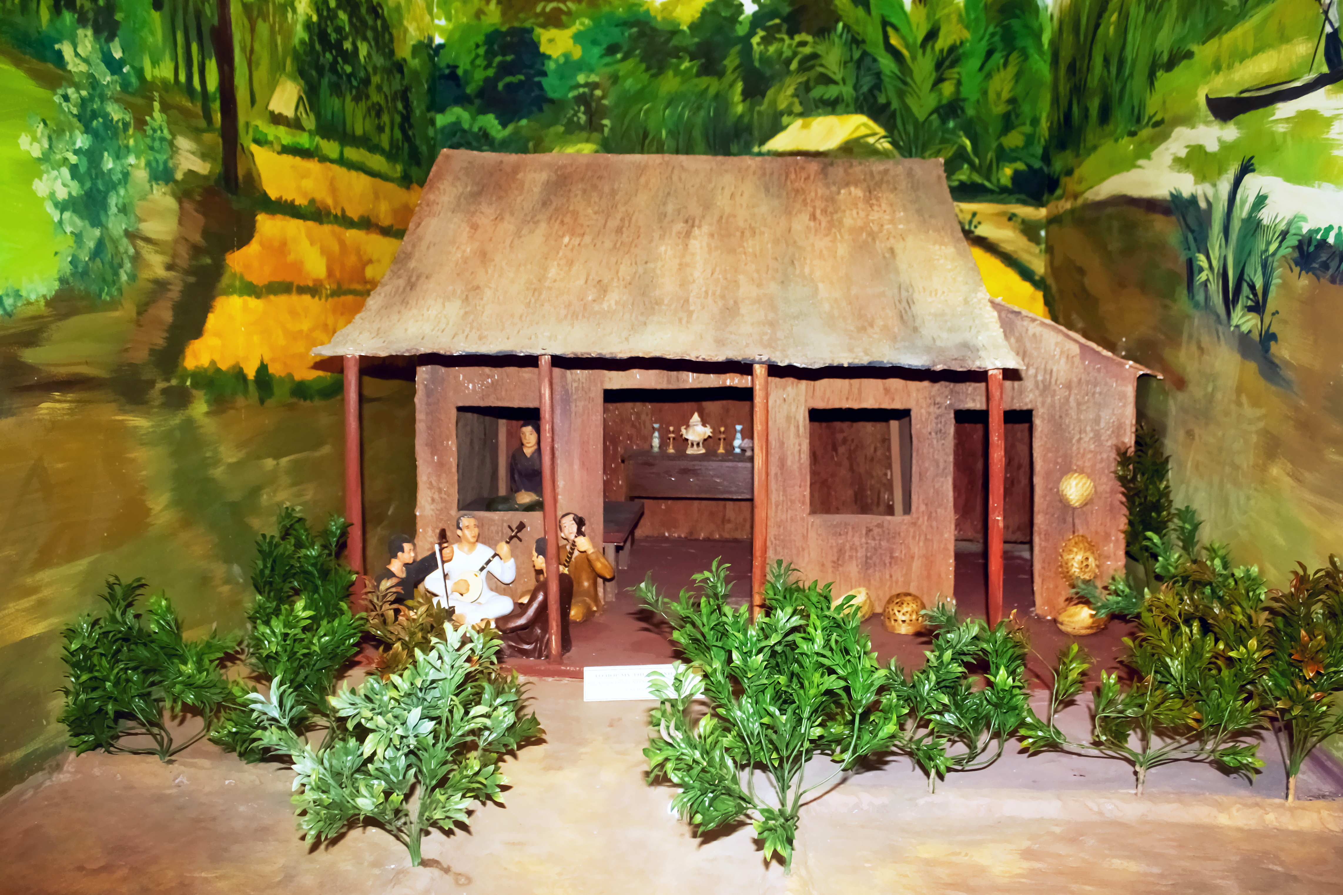 Mô hình tái hiện một cảnh đờn ca tài tử ờ nông thôn Nam Bộ trong Khu lưu niệm Nghệ thuật Đờn ca tài tử Nam Bộ và Nhạc sĩ Cao Văn Lầu, tọa lạc tại phường 2, thành phố Bạc Liêu, tỉnh Bạc Liêu, Việt Nam.